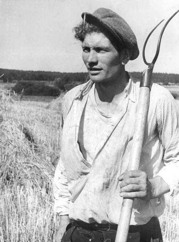 Brachhaben, Einzelbauer Zentralbild Neuer Tag -15.8.1955 Zum 10. Jahrestag der demokratischen Bodenreform. Bernd Kruse aus Westdeutschland erhielt Neubauernwirtschaft in der DDR-Im Adenauer-Staat gab es für den schon seit Jahren arbeitslosen Bernd Kruse aus Emden keine Aussicht, jemals wieder in Arbeit und Brot zu kommen. Er lebte mit seiner Familie in einer elenden Wohnung. Als er Anfang dieses Jahres mit einer Delegation aus Westdeutschland in die DDR kam und unsere Erfolge sah, entschloss er sich, in unsere Republik überzusiedeln. Er wählte das Dorf Brachhaben im Kreise Angermünde zu seiner neuen Heimat. Dort bewirtschaftet er seit Mai eine Neubauernstelle aus Bodenreformland. UBz: Neubauer Bernd Kruse